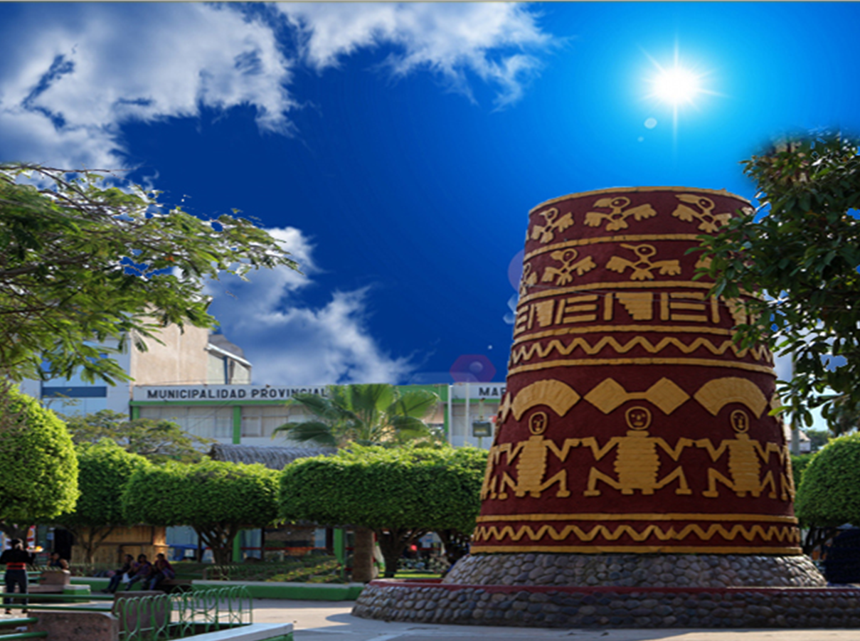 icono que representa la cultura chachapoyas del gran pajaten